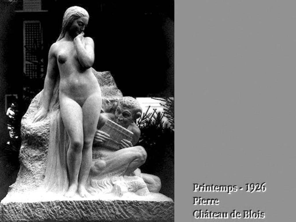 Groupe